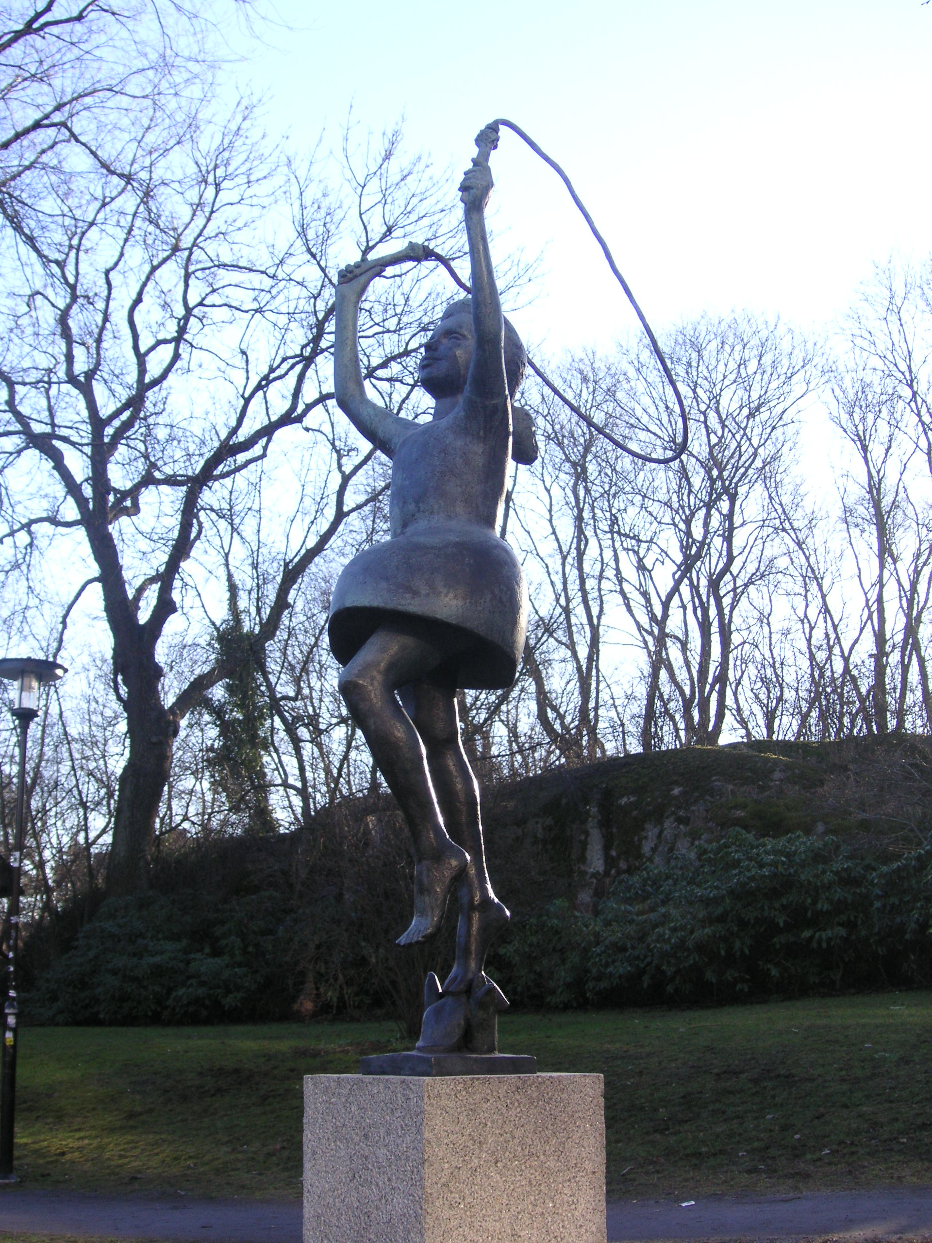 Skulptur "Flickan med hopprep" av Clarence Blom i Högalidsparken i Stockholm